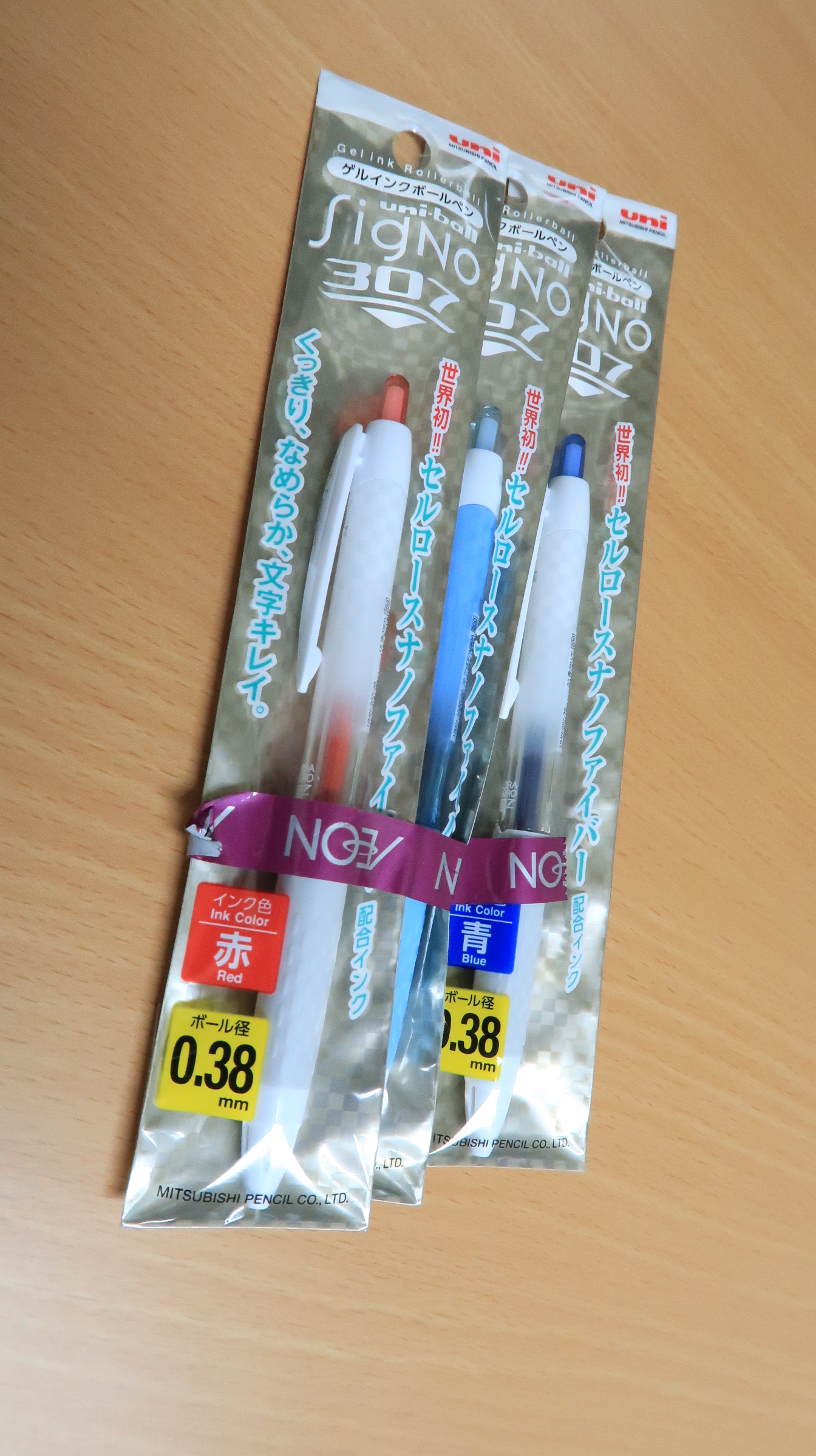 真ん中の本体が水色のものが黒です。